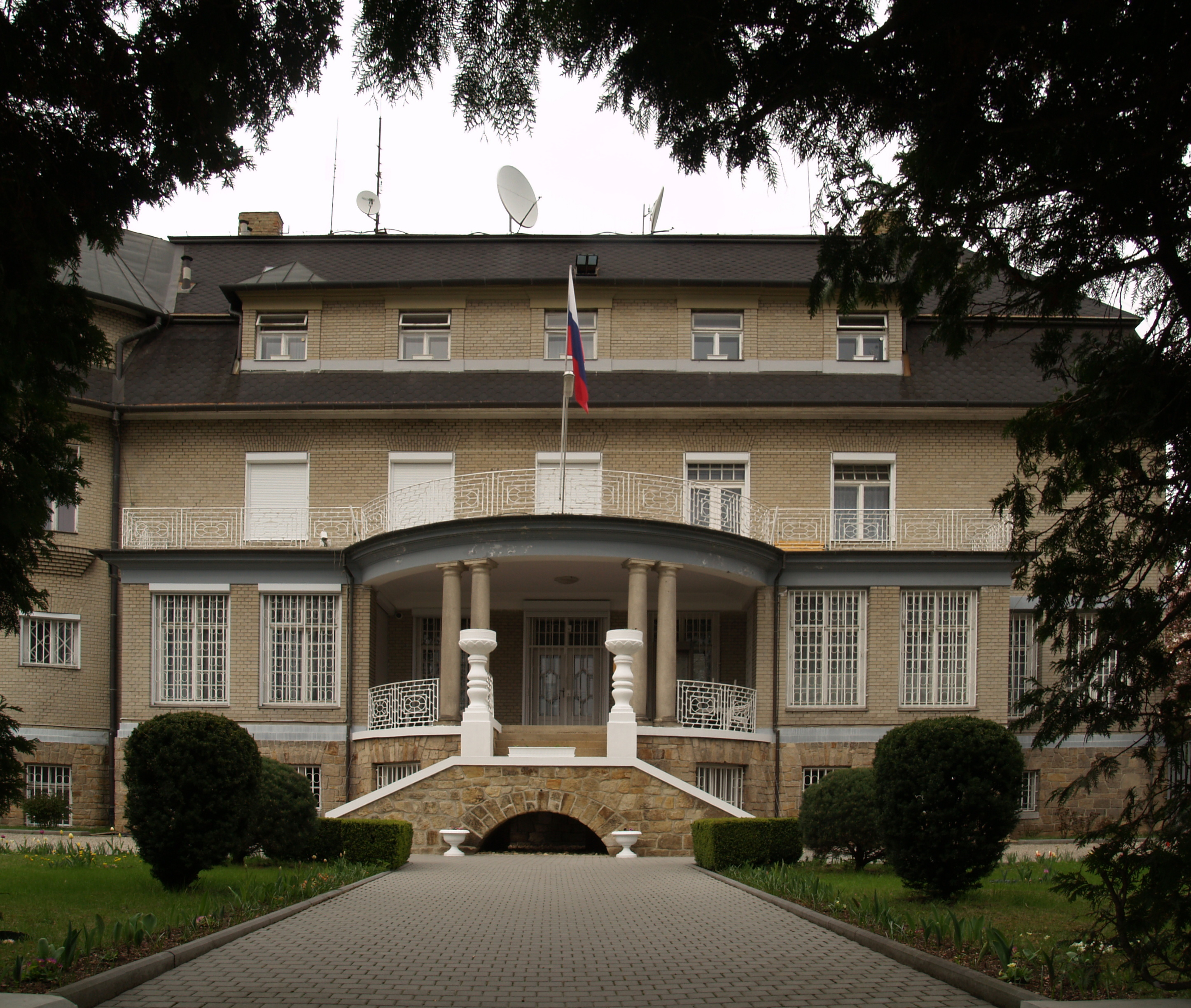 Hlavní vchod Hechtovy vily